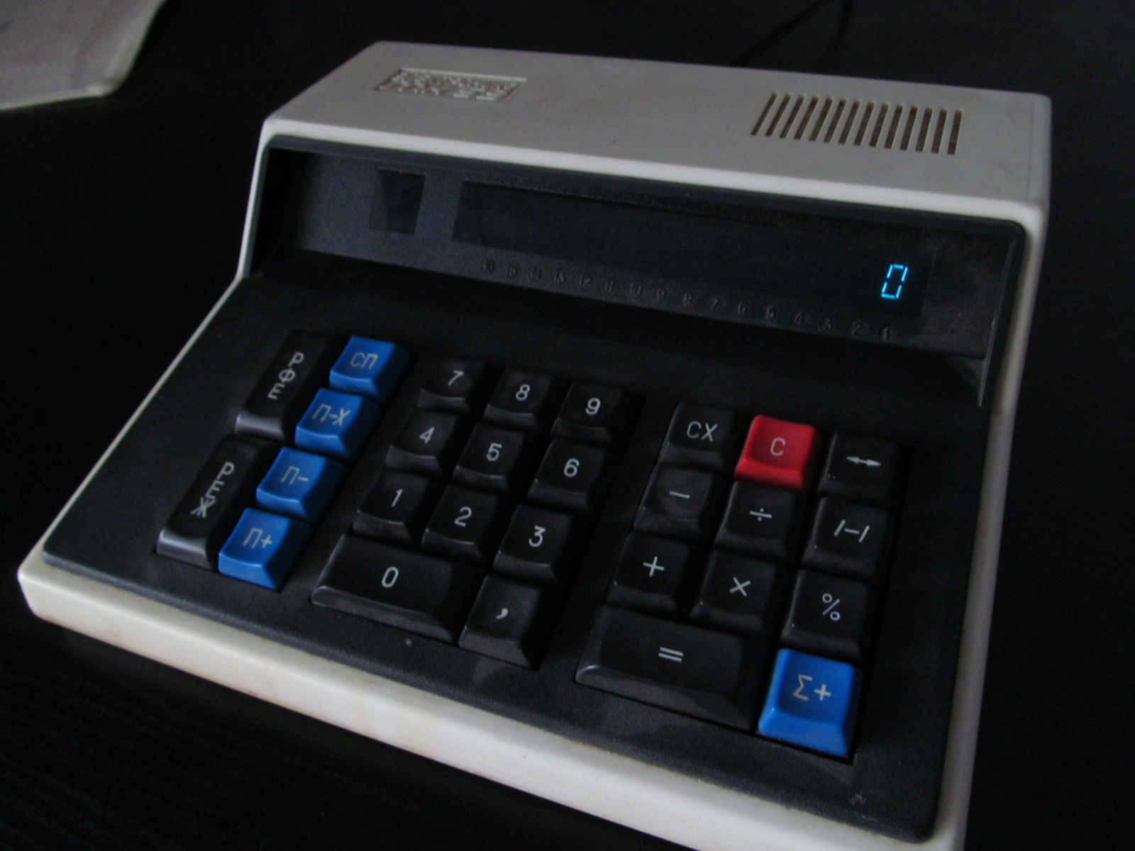 калькулятор Электроника МК-59(1). Включений. В профіль